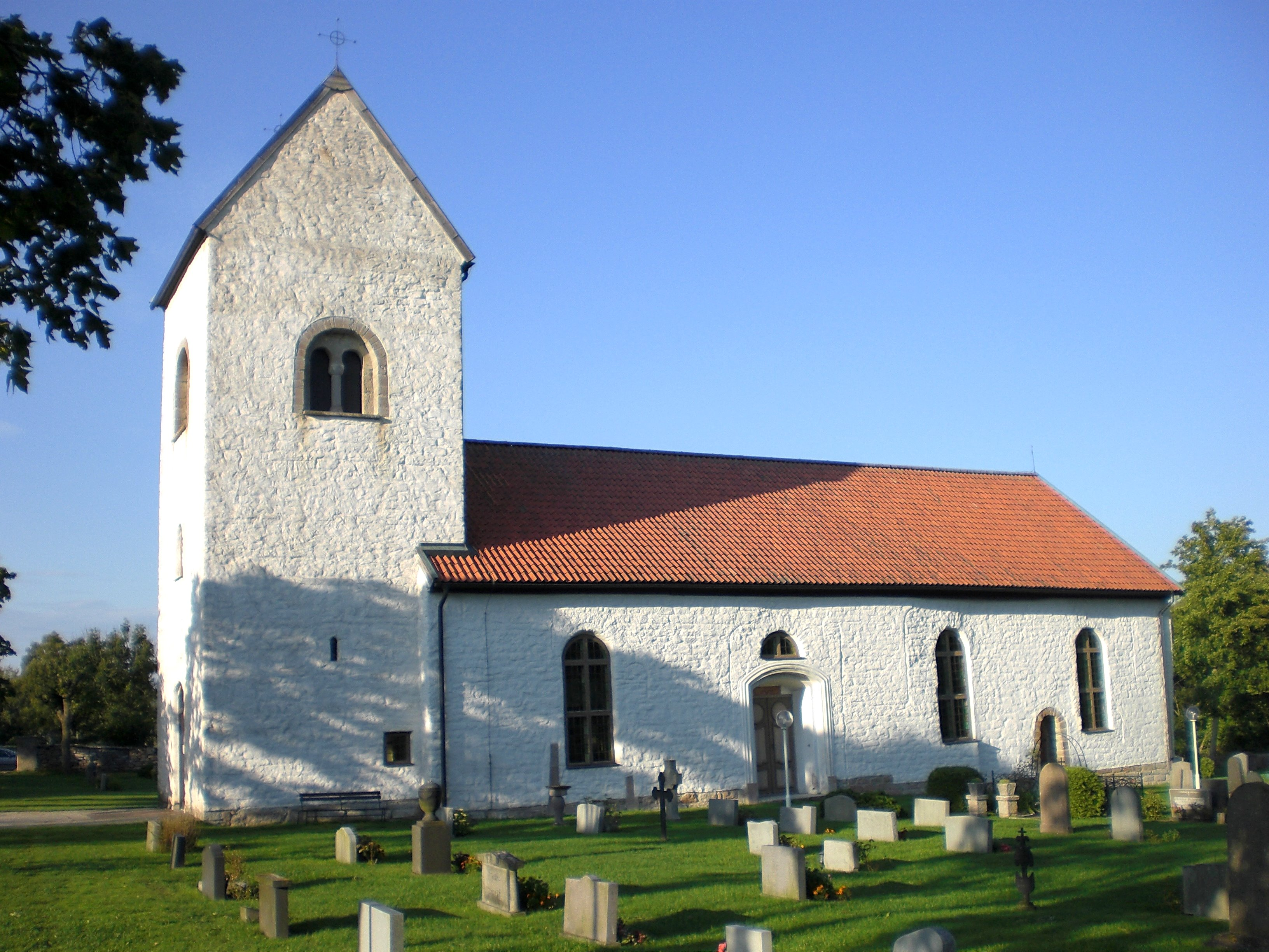 Kirche in Långlöt (Südseite), Öland, Schweden